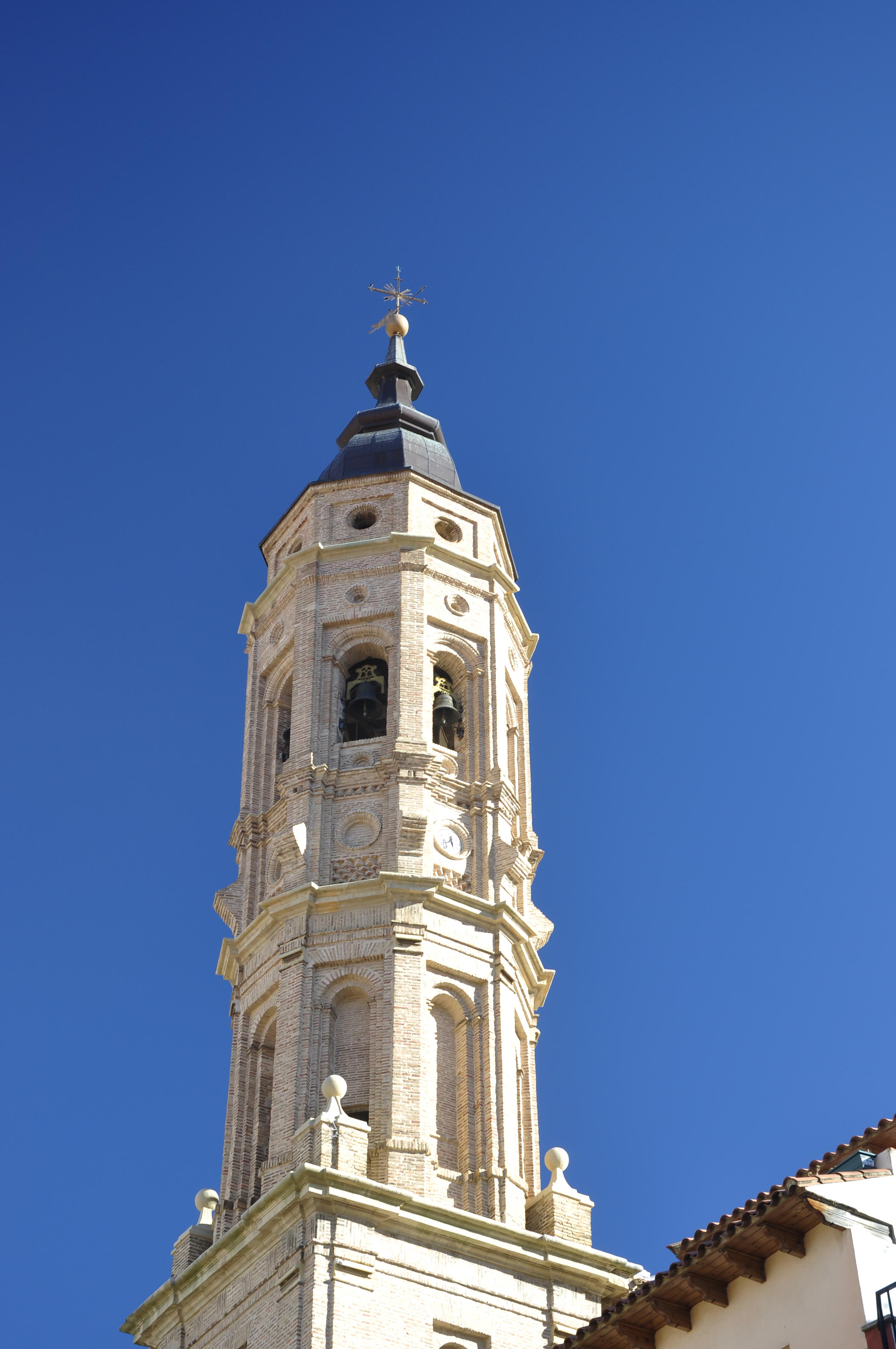 Se trata de un edificio de notables dimensiones articulado en diferentes volúmenes. Destaca principalmente el volumen de la nave central, flanqueada por las naves laterales, a las que se adosan capillas en sus tres primeros tramos, creando un marcado escalonamiento. Las tres naves aparecen cubiertas con bóvedas de crucería estrellada, mientras que las capillas presentan cubierta cupulada rematada por linterna. El uso del estuco y la policromía en tonos azules, amarillos y blancos en el interior hacen más plástica la articulación de sus diferentes partes. Por otro lado, la fábrica está realizada en sillar de piedra caliza y al exterior sobresalen los potentes contrafuertes, la fachada monumental y la esbelta torre de cuatro cuerpos ubicada en su lateral izquierdo. La fachada responde al modelo de fachada barroca compuesta por dos cuerpos flanqueados por dos pares de columnas salomónicas sobre plinto, separados por un entablamento y coronados por un frontón curvo. En cada cuerpo se abre un vano, correspondiendo el inferior poligonal a la portada y el superior de medio punto a una hornacina. La torre presenta estructura mixta, de planta cuadrada en su dos cuerpos inferiores y octogonal en los dos superiores, realizados éstos últimos en ladrillo siguiendo la tradición constructiva mudéjar y rematados por un bulboso chapitel barroco.